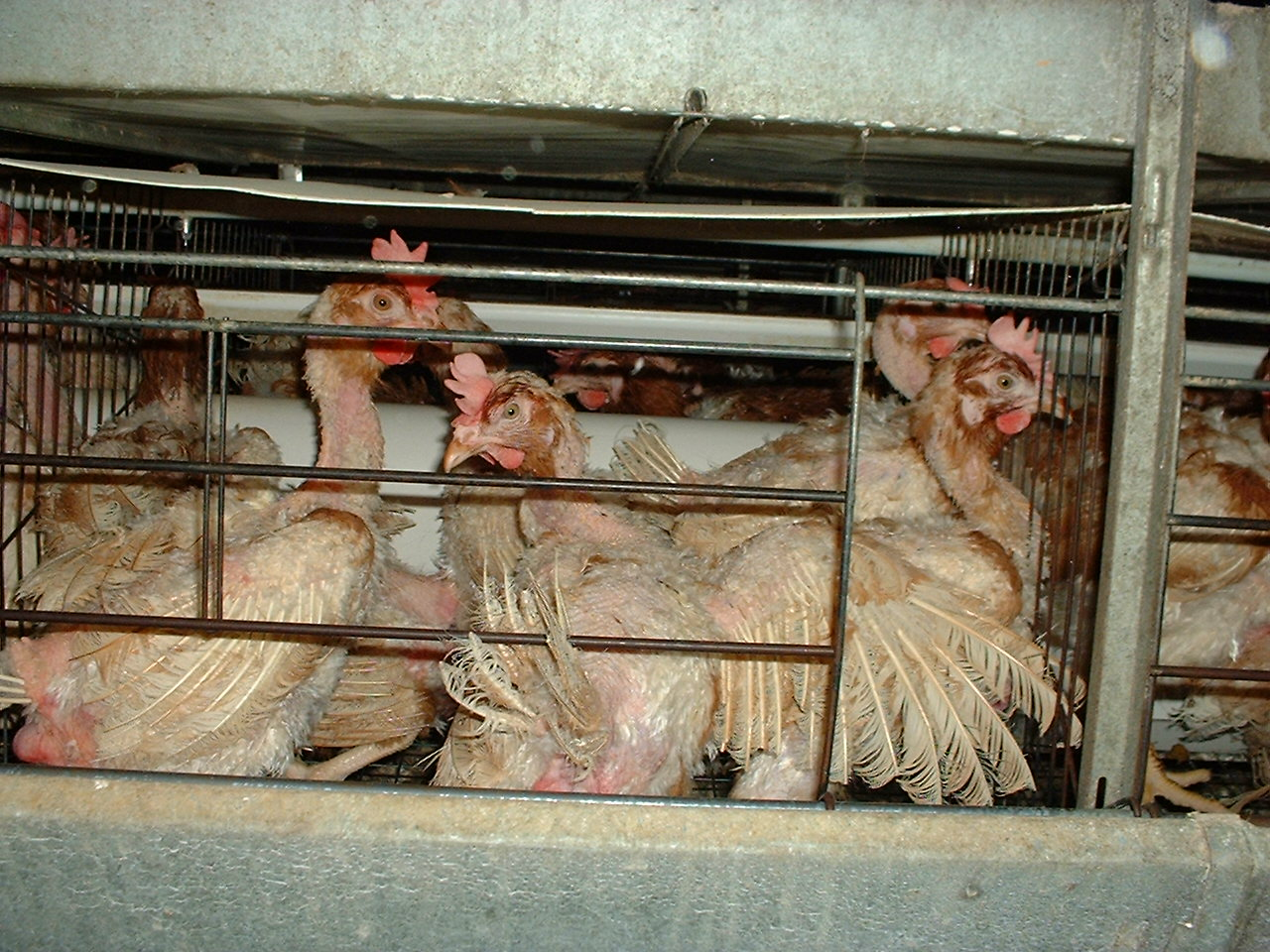 Legebatterie in Deutschland, Niedersachsen (2004)